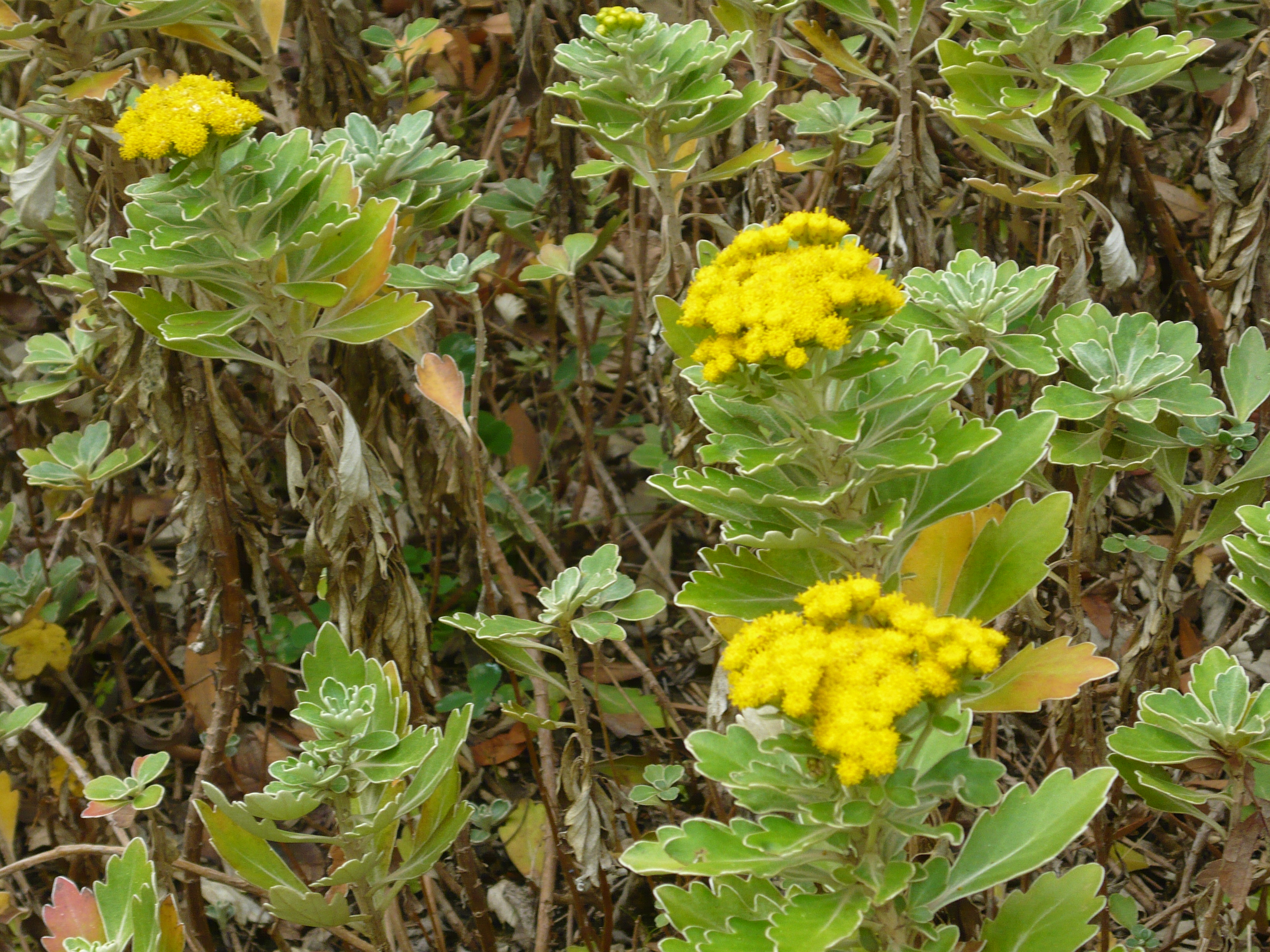 Ajania pacifica. Real Jardín Botánico de Madrid